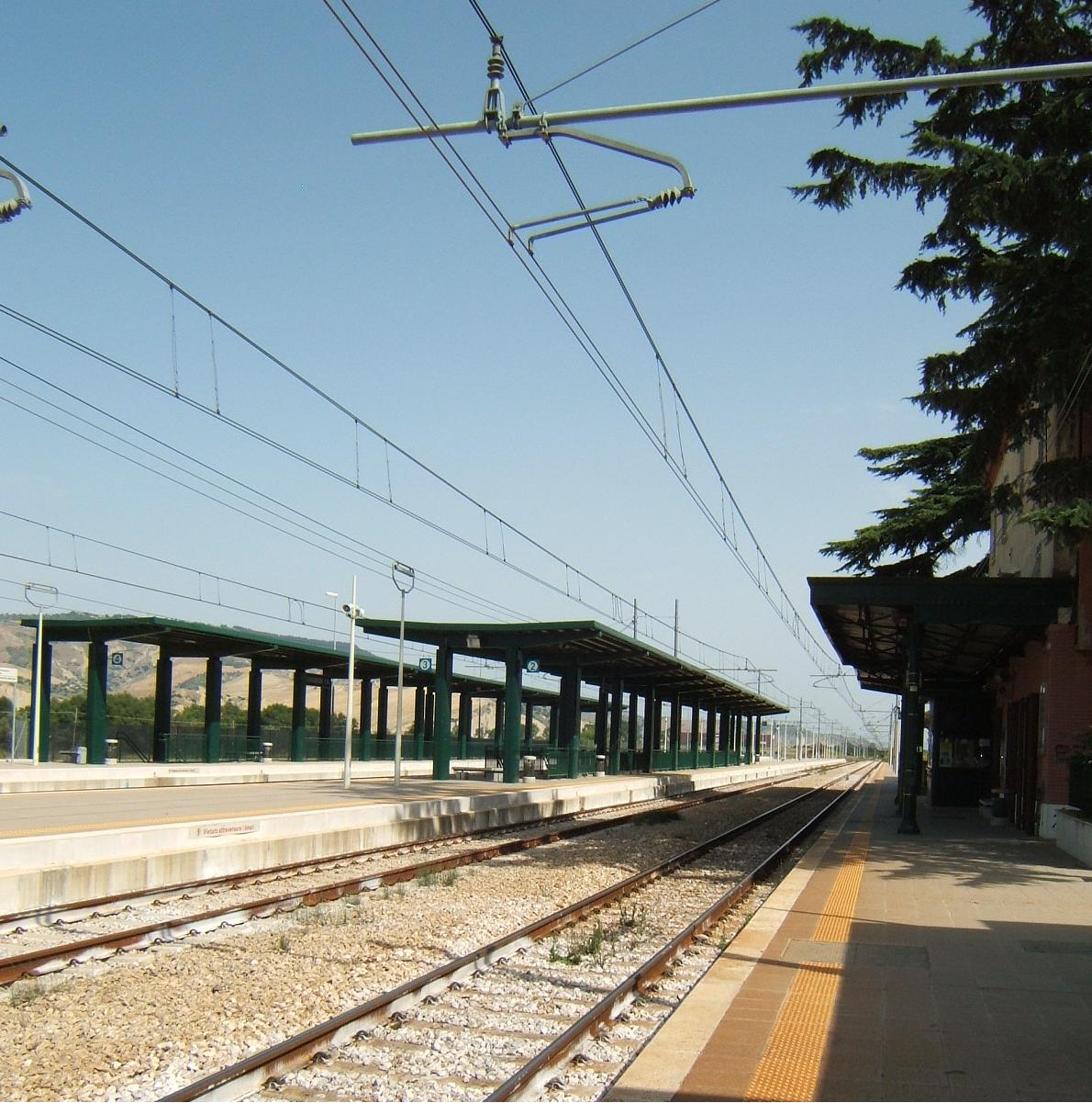 Binari della stazione di Ferrandina.